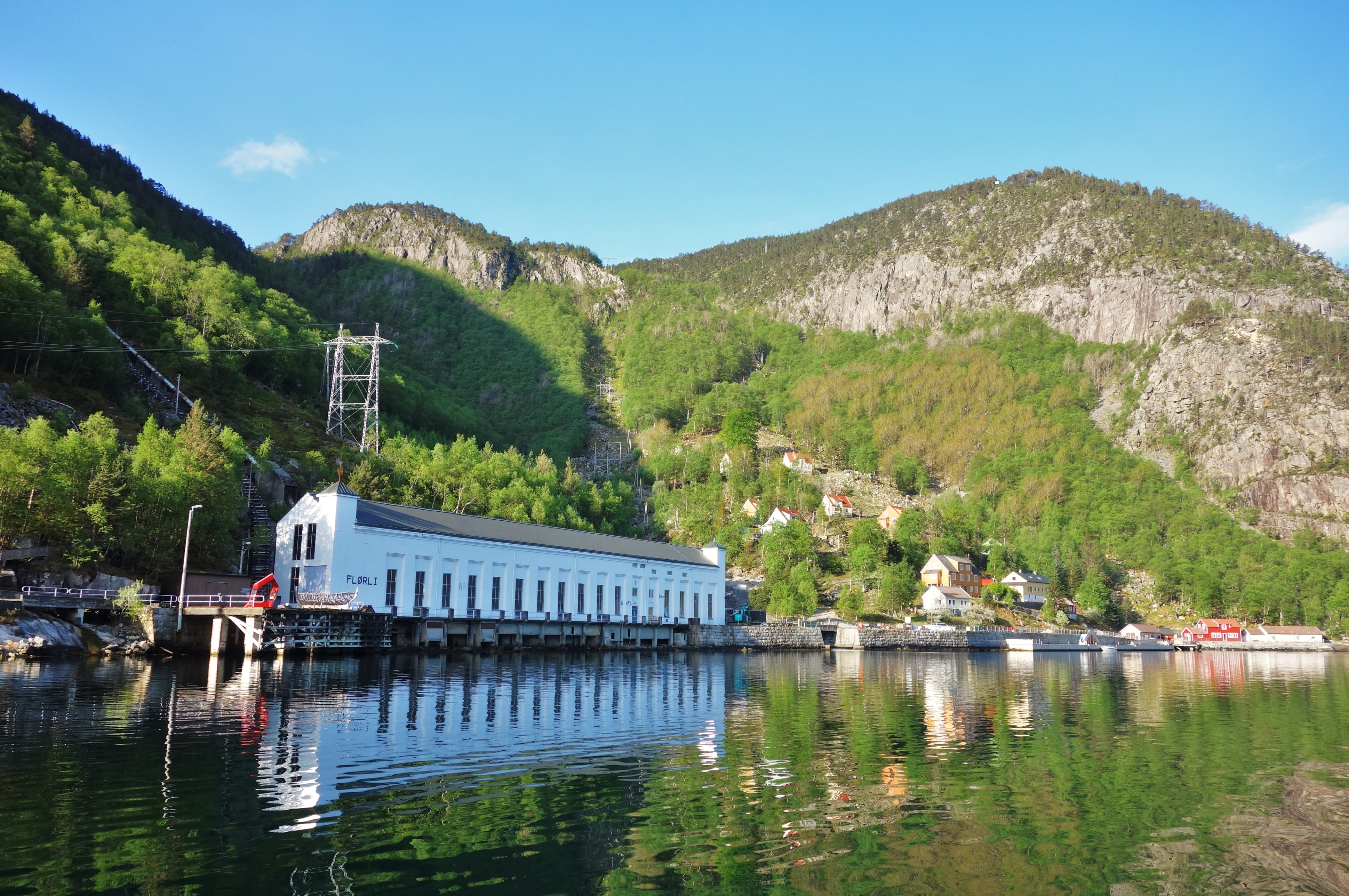 Den store hvite bygningen er den nedlagte kraftstasjonen som nå har sommeråpen kafé og en utstilling om bygdas historie.